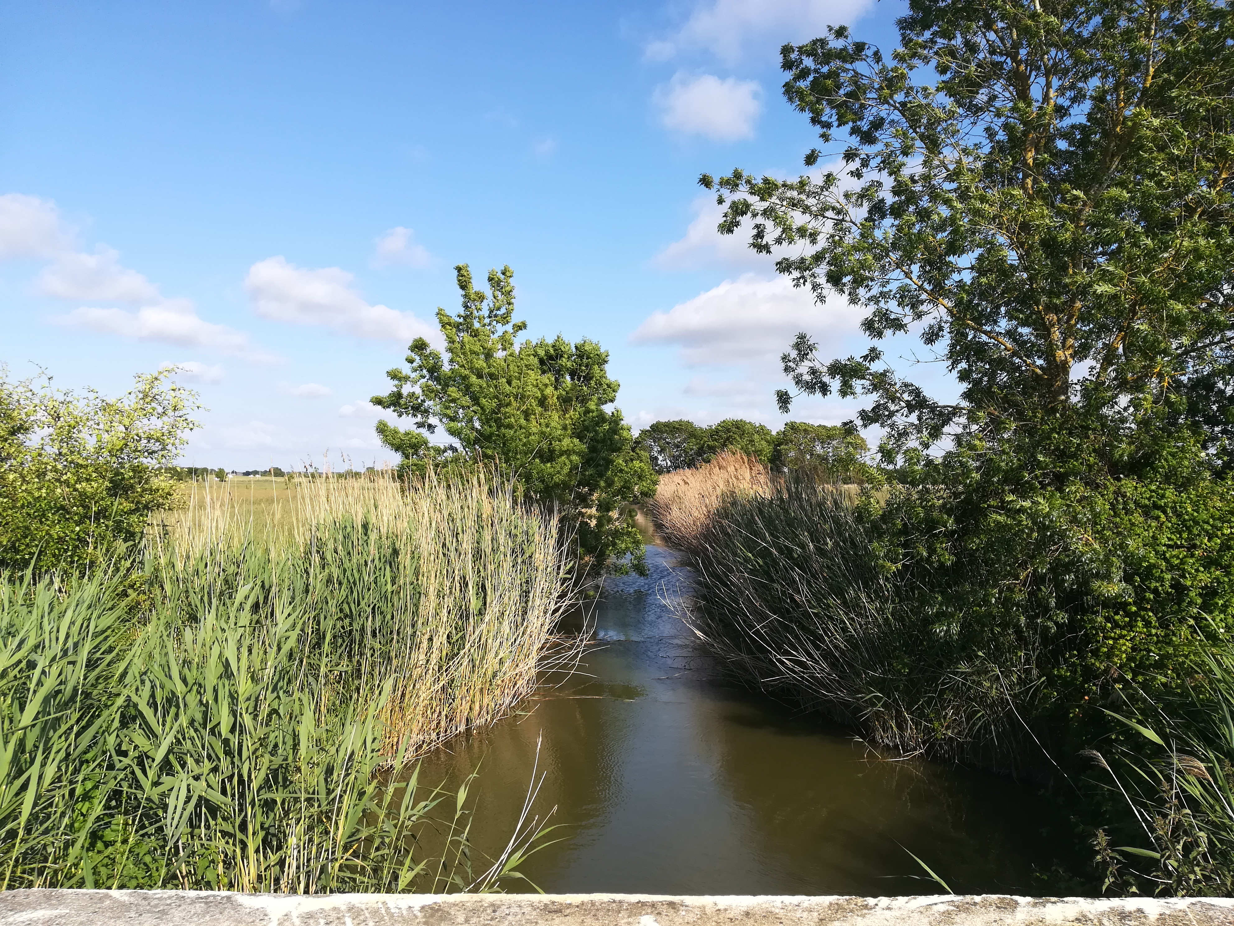 L'écours des Maurines, cours d'eau dans le marais de St-Augustin à Etaules (Charente-Maritime, France)